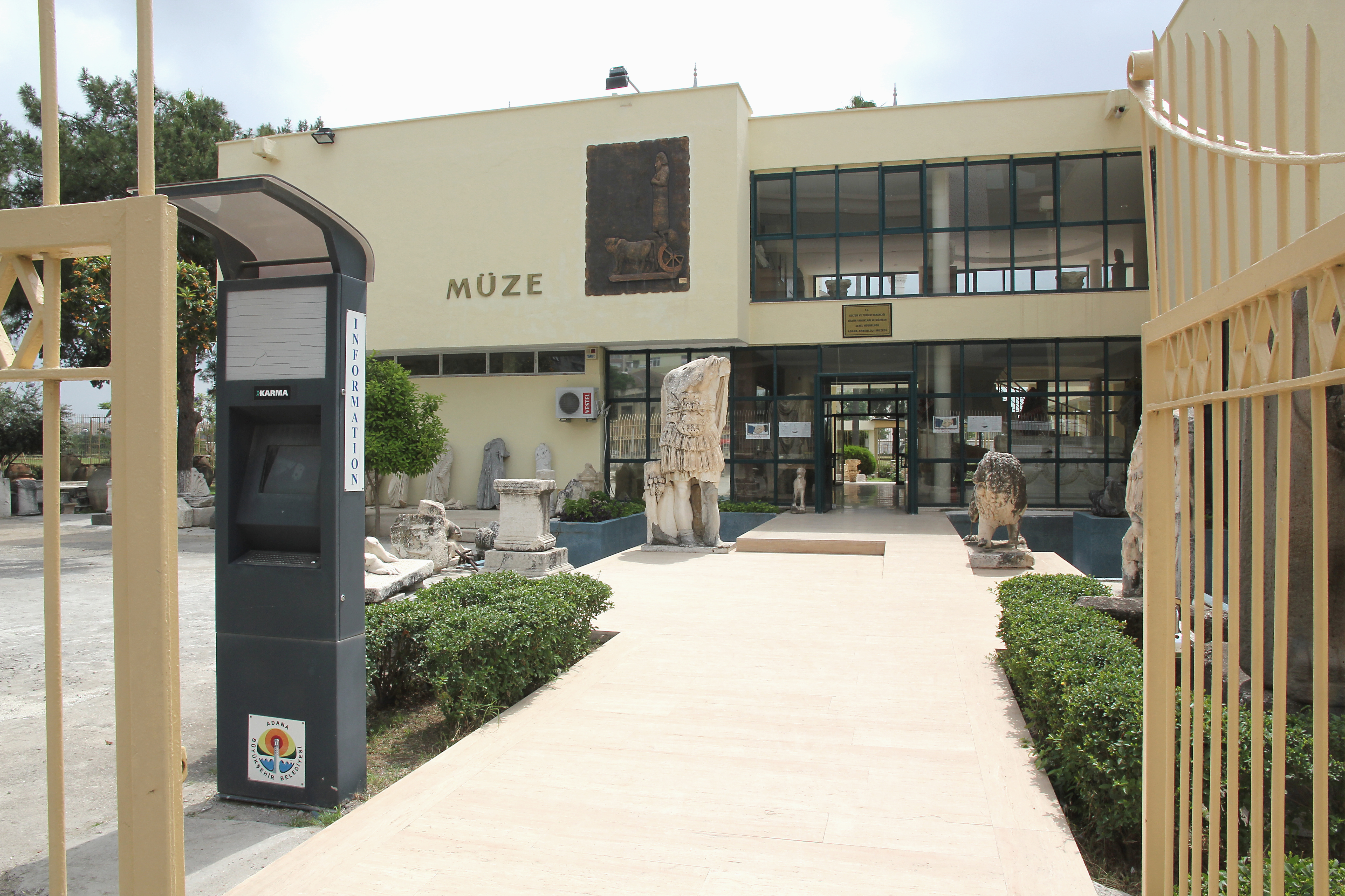 Archäologisches Museum Adana, Südtürkei, früheres Gebäude bis 2016